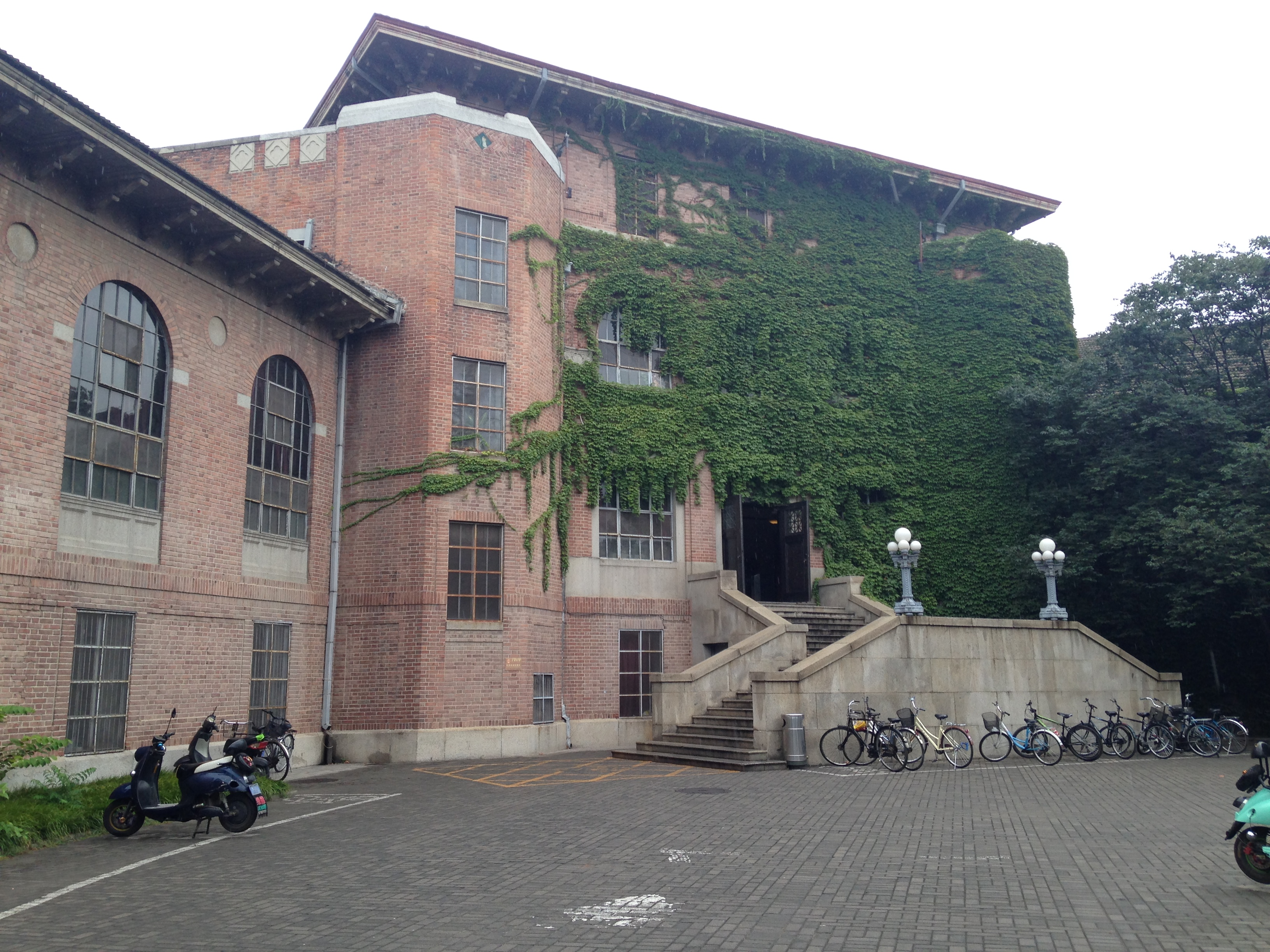 清華大学・旧図書館